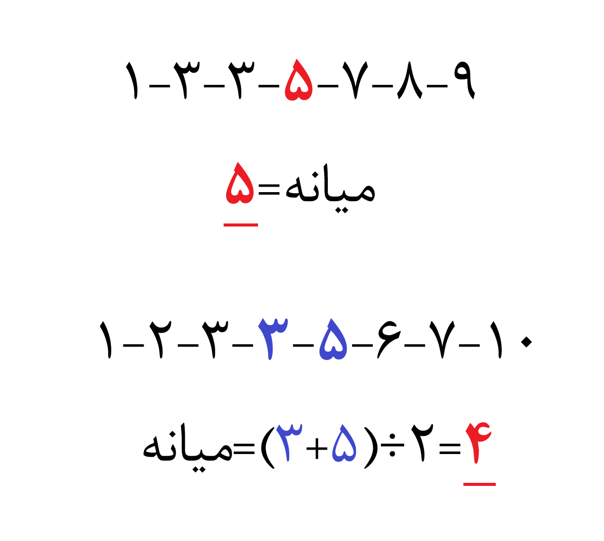 دو مثال از میانه در فضای گسسته